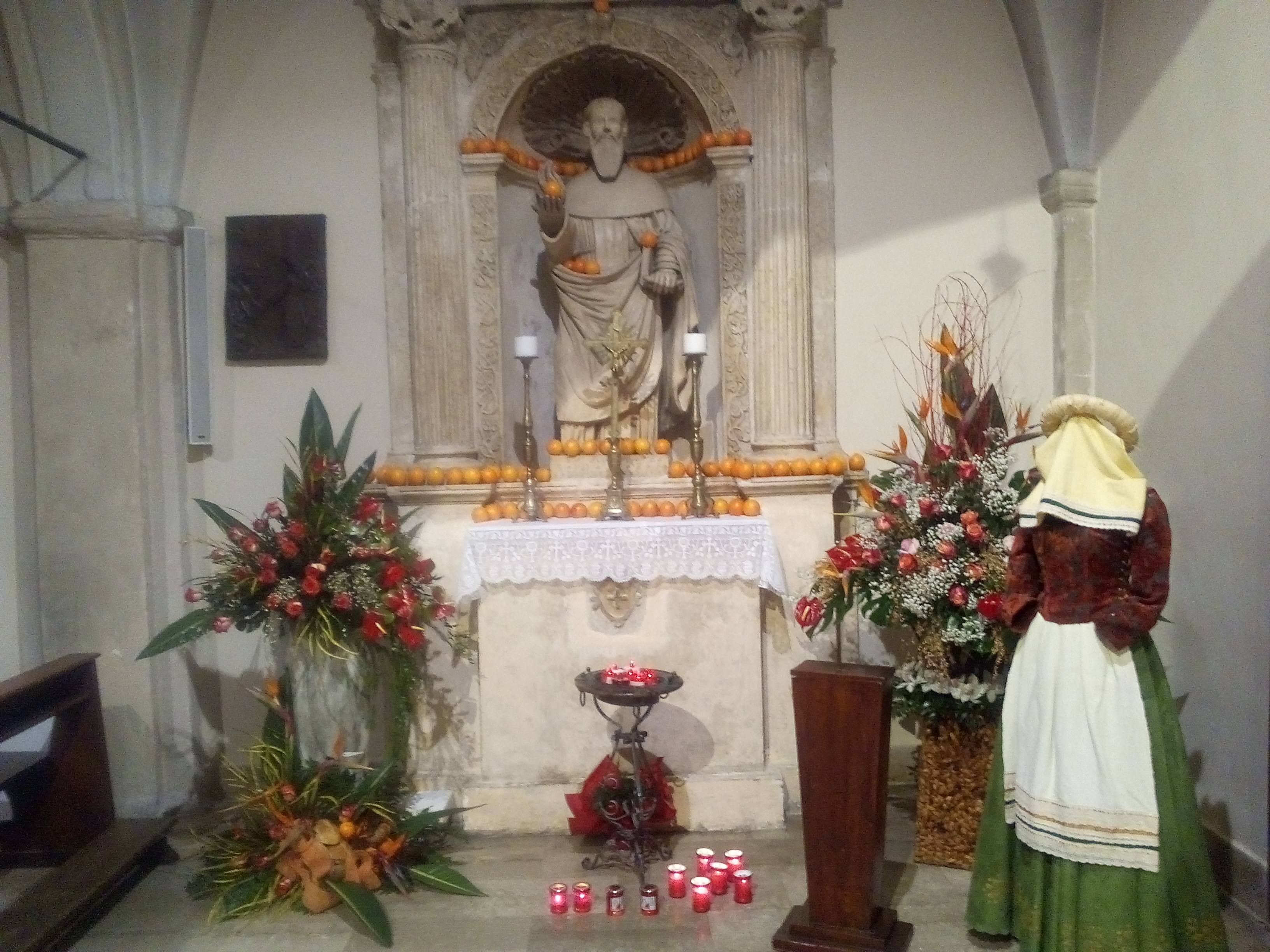 La statua di Sant'Antonio Abate nella chiesa parrocchiale di Collelongo circondata dalle arance e da un abito tradizionale.